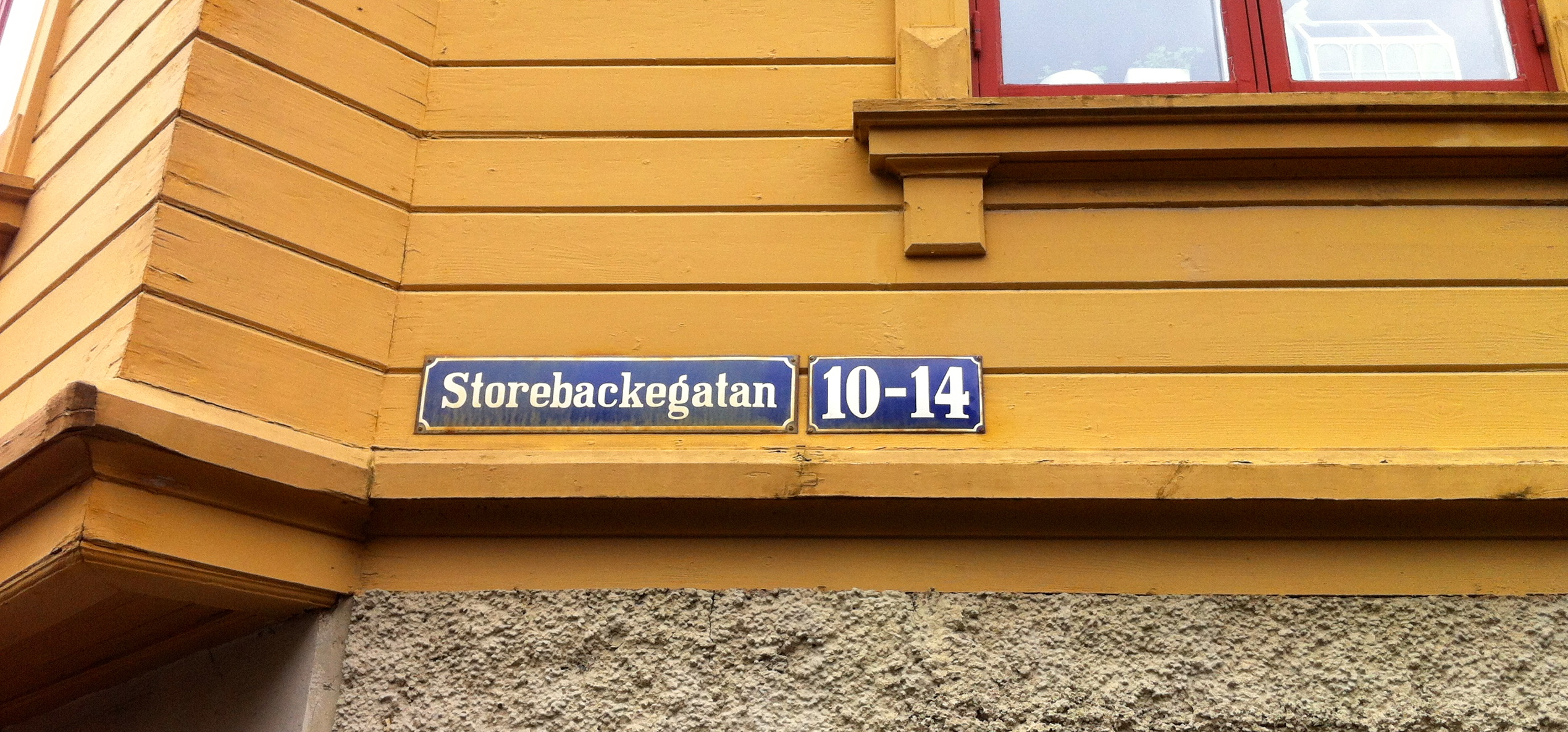 Gatuskylten Storebackegatan, Kvarteret Skogen, Göteborg